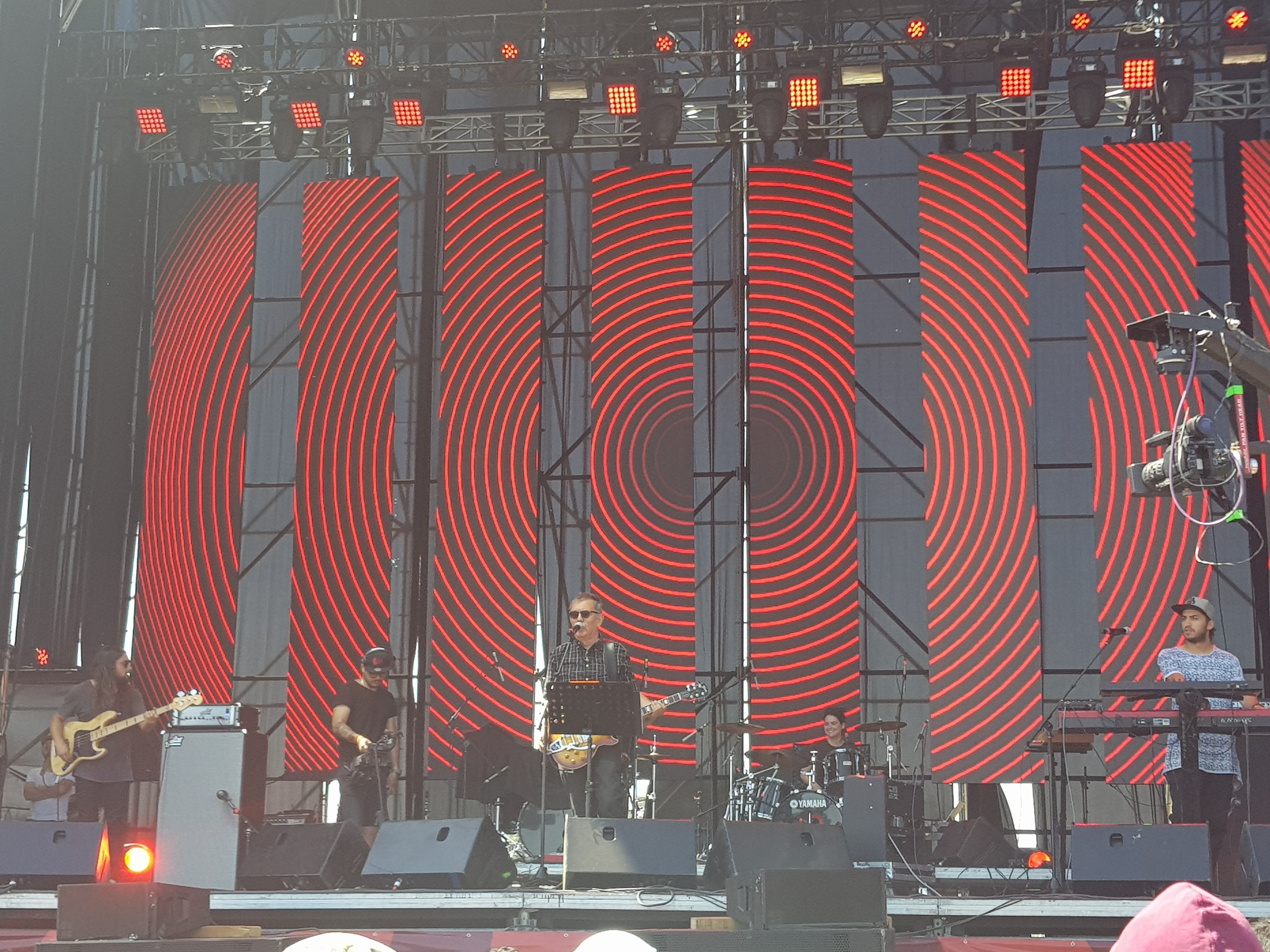 Electrodomésticos, en la cumbre del Rock Chileno 2018, 27/01/2018